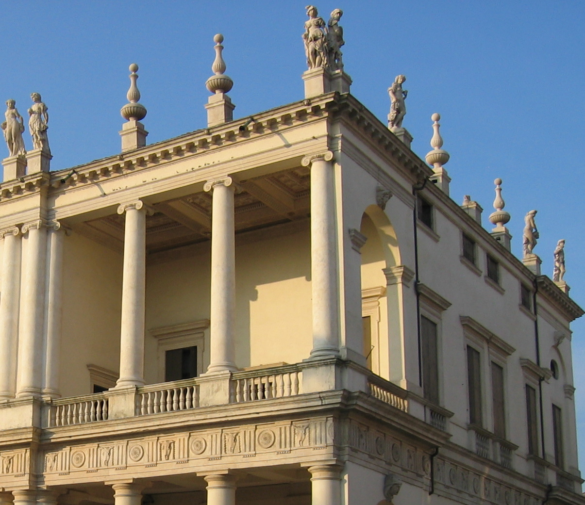 Detail van de daklijst van het Palazzo Chiericati. Eigen foto Oktober 2006